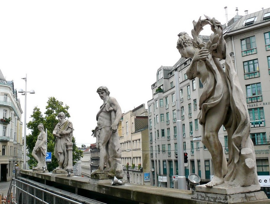 Figuren am Eingang zum Esterházypark